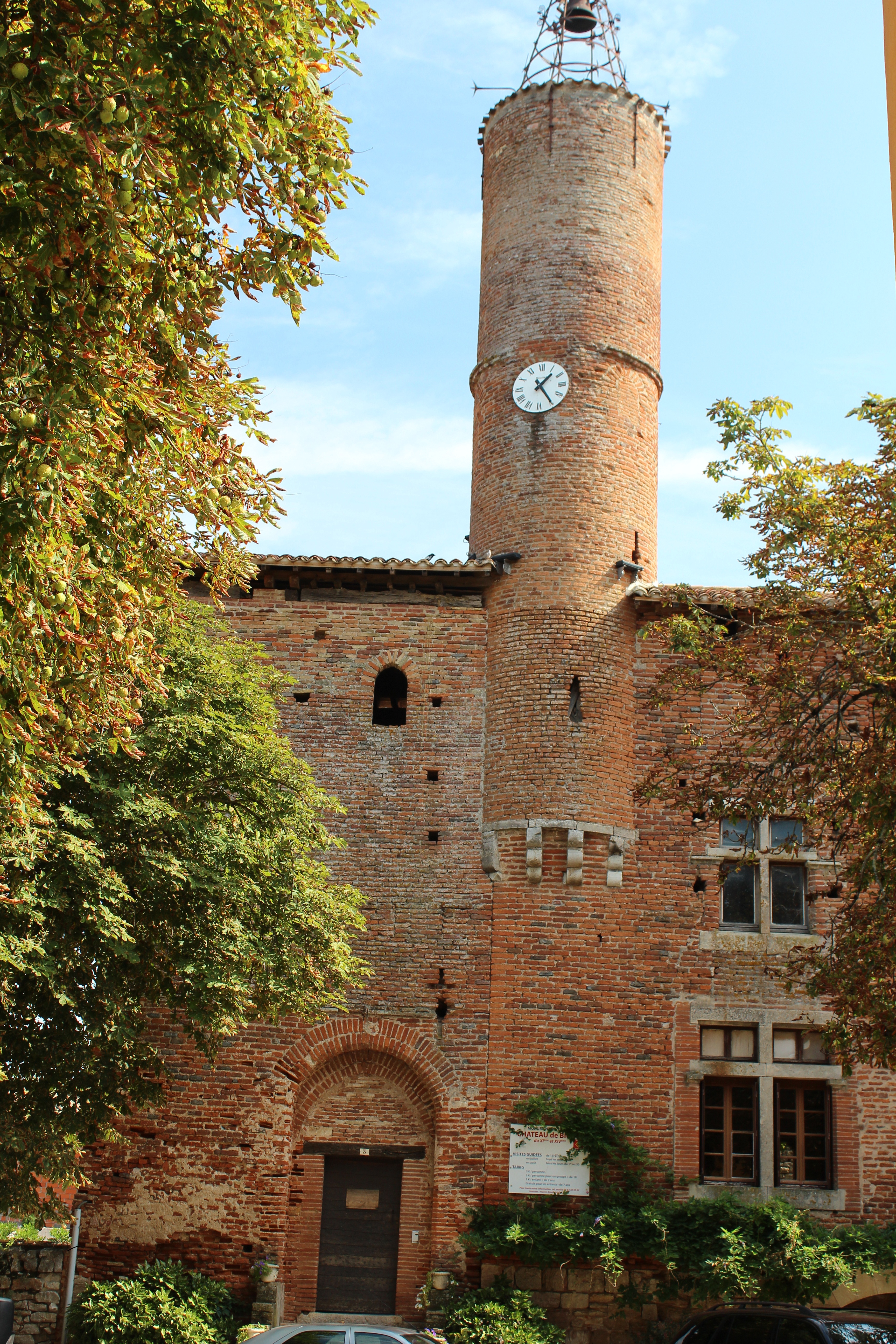 Façade du château de BIOULE Château templier DU XI &IV scs